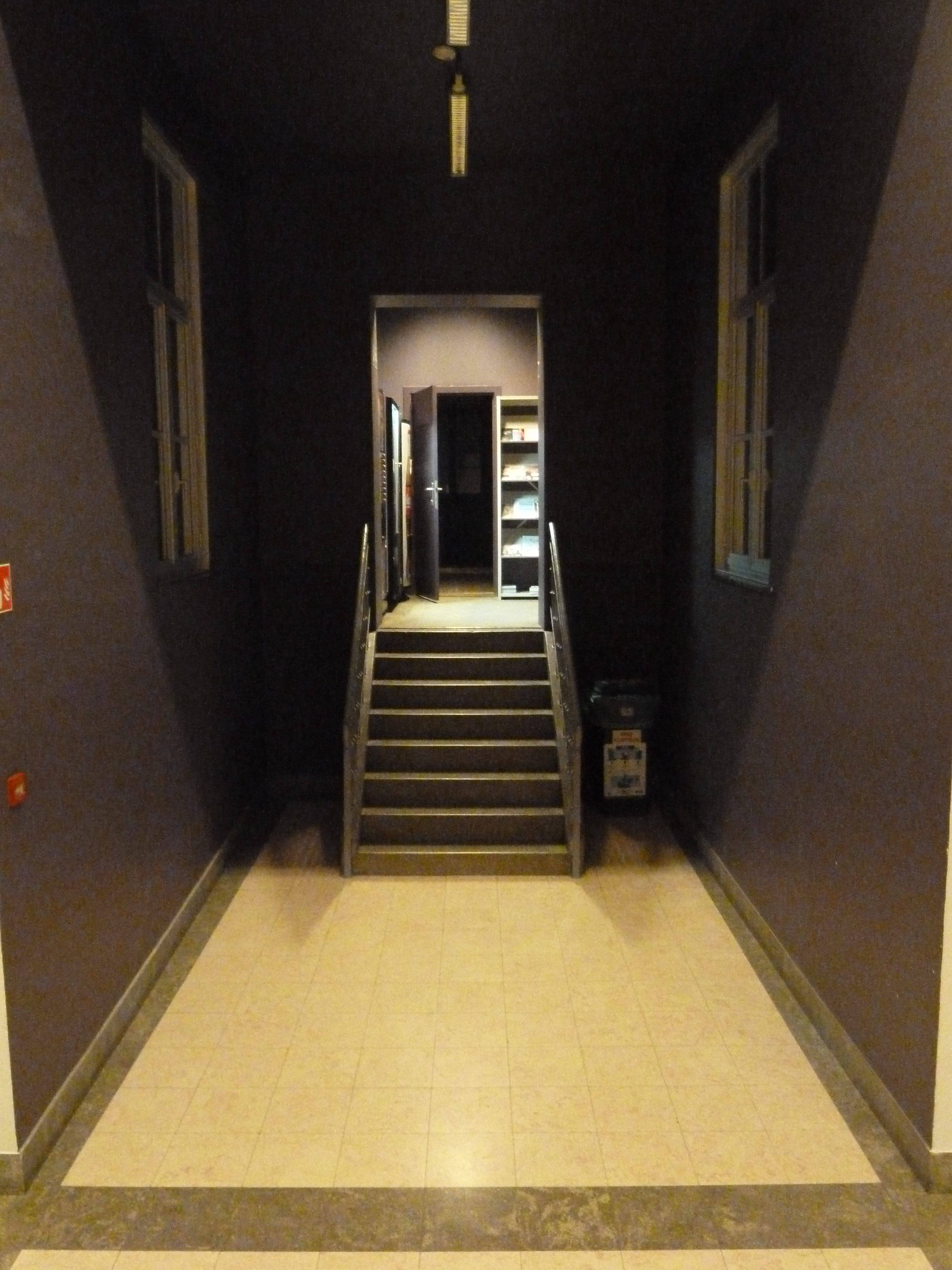 Eerste verdieping KASK Kortrijk